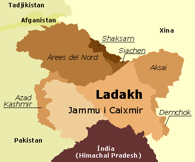 Mapa de situació de Ladakh, Jammu i Caixmir, Índia